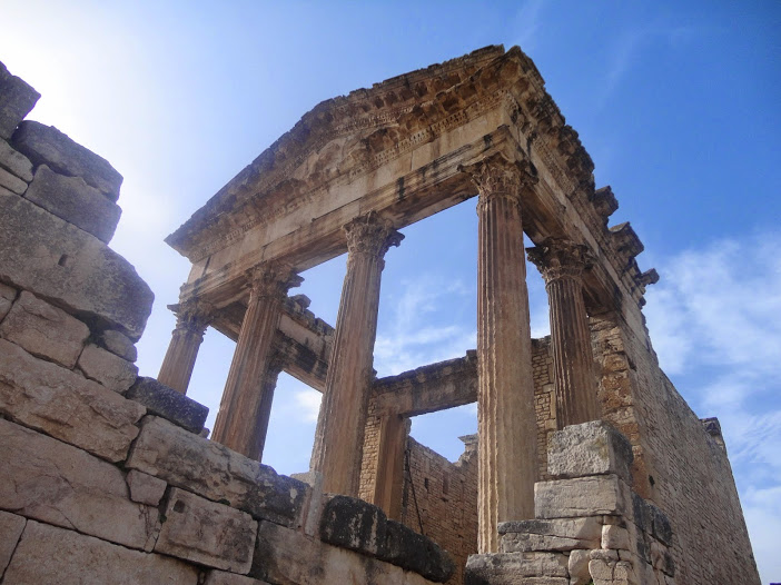 Temple aux six colonnes, Dougga